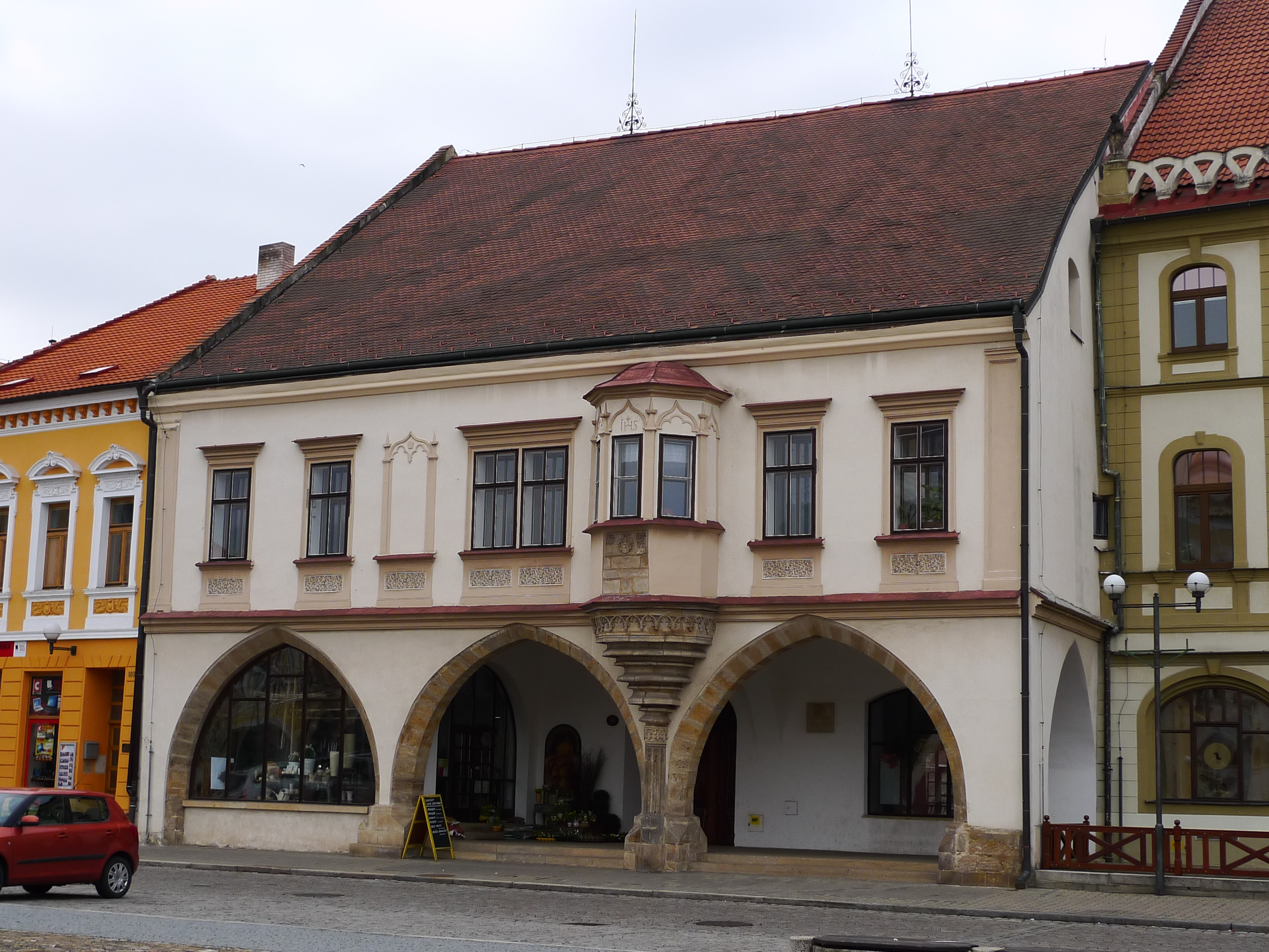 Měšťanský dům, Mírové náměstí 184, Kadaň